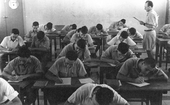 1941-43 אריה בן גוריון מגויס להוראה בבית הספר המקצועי טיץ ביגור לילדי חברת נוער